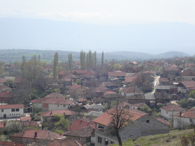 Поглед към селото Побоже, Република Македония.